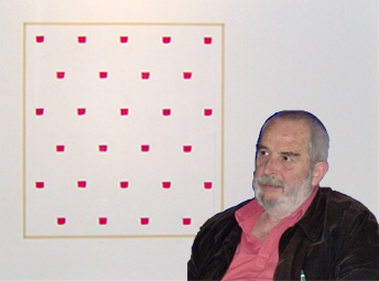 Portrait de Niele Toroni